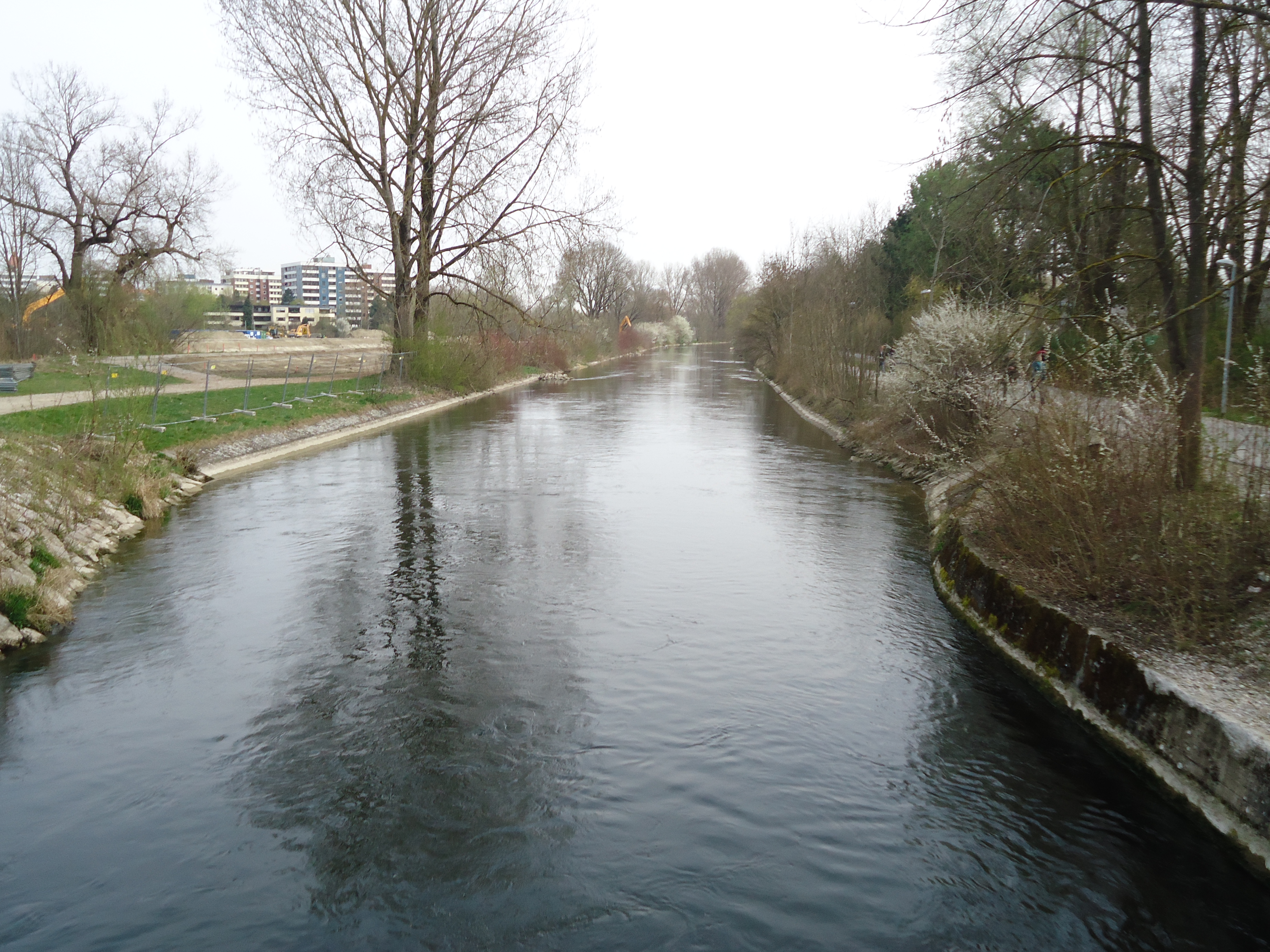 Beginn Wertachkanal Augsburg